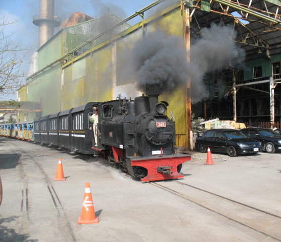 溪湖糖廠的觀光蒸氣火車。